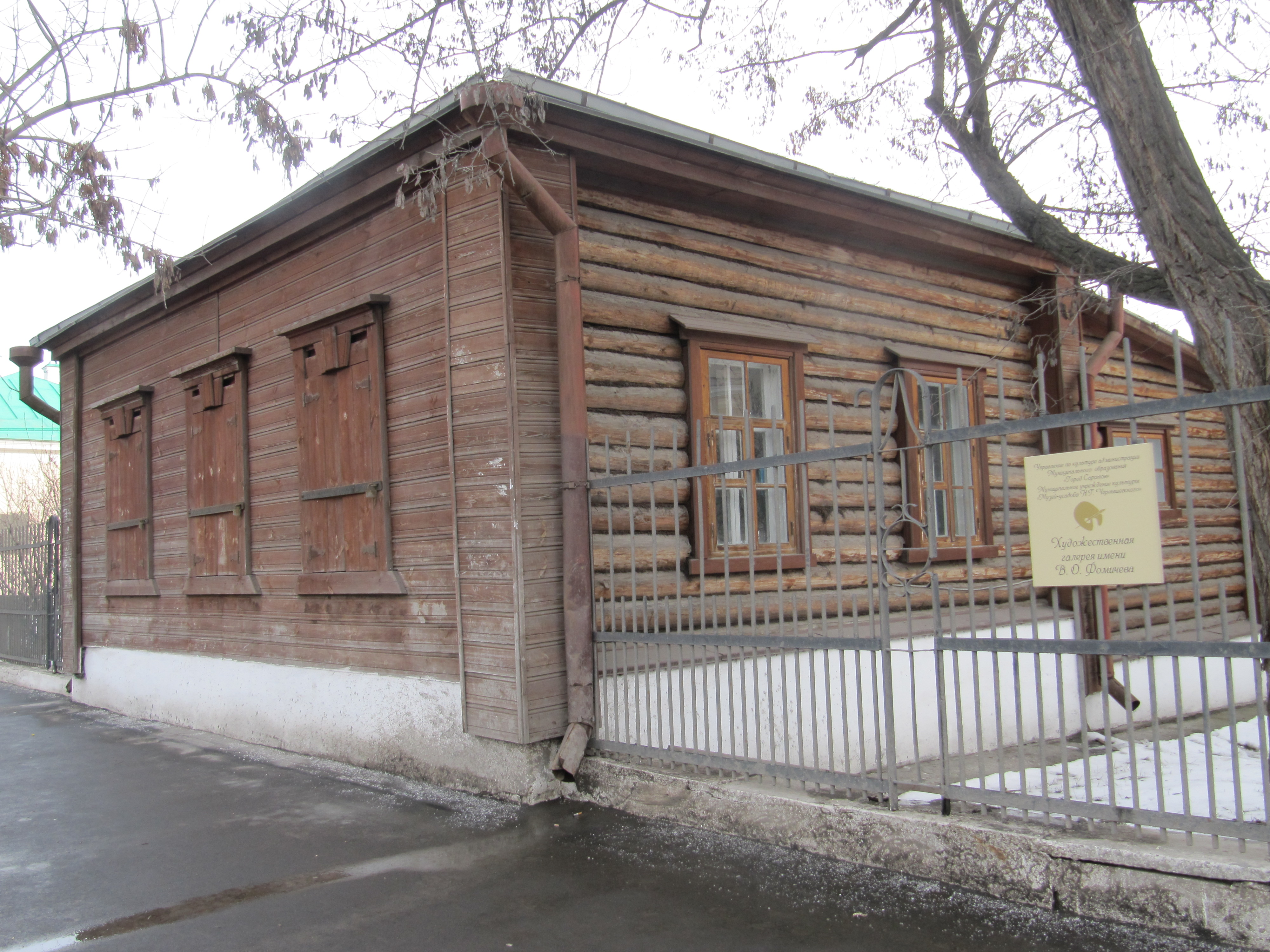 Художественная галерея им. Фомичёва В.О. ул. Чернышевского 142. Саратов